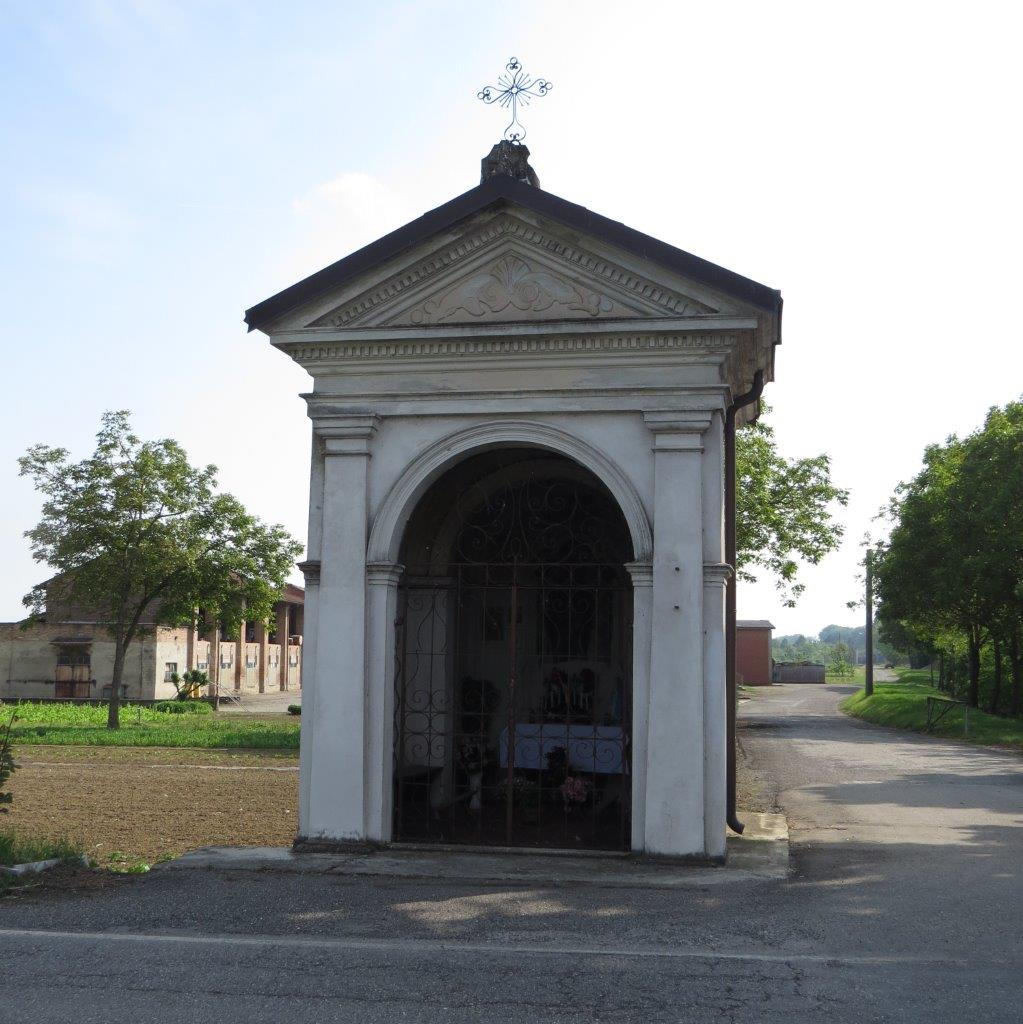 Lungo la strada provinciale che da Cortemaggiore conduce a Piacenza